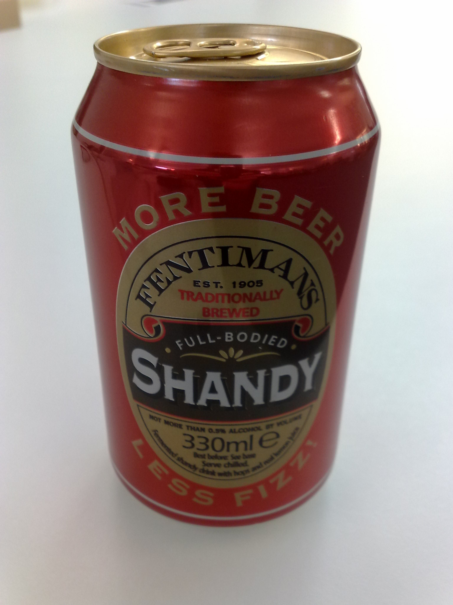 בירה שנדי בפחית